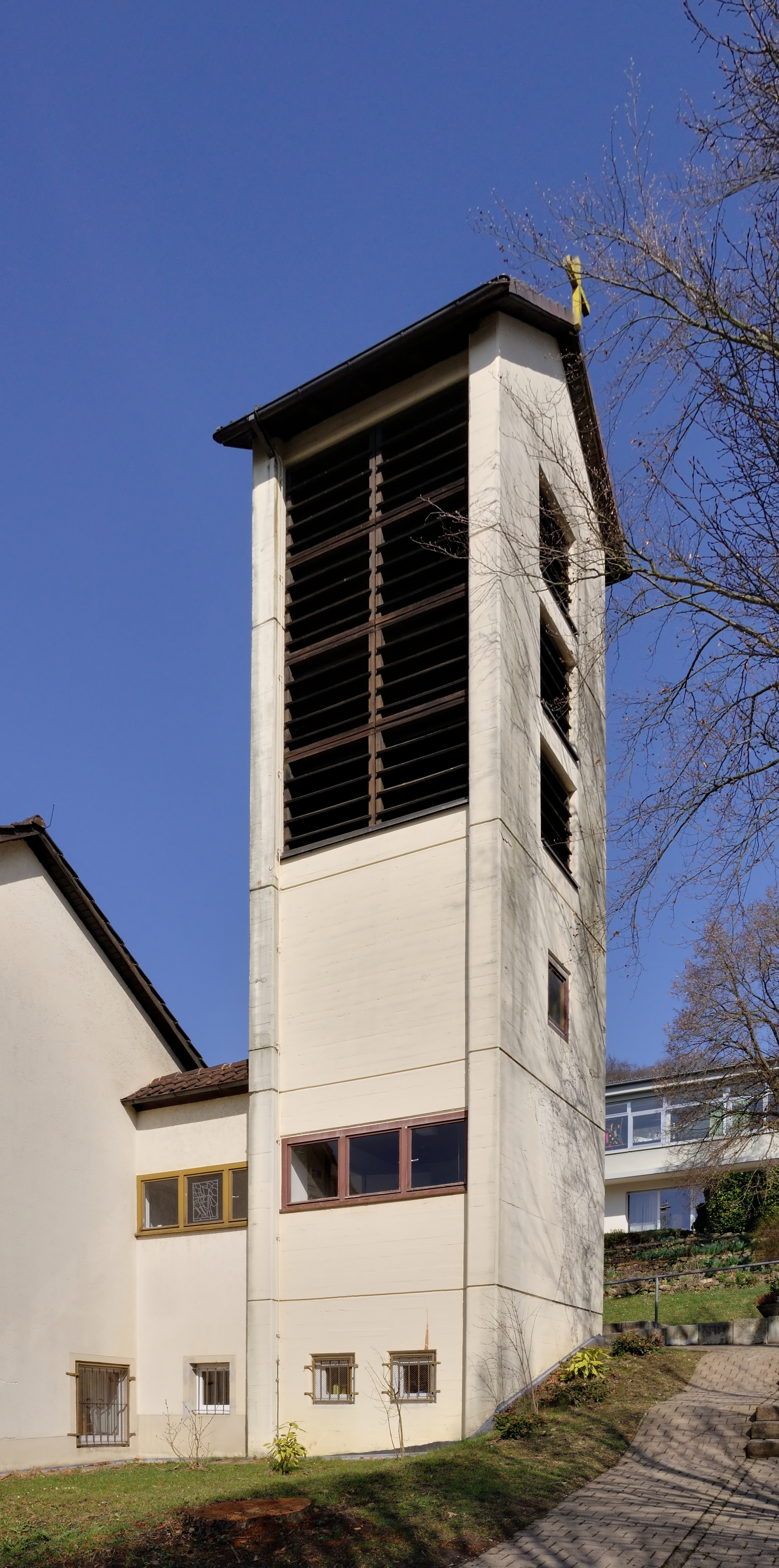 Inzlingen: Evangelische Kirche, Glockenturm